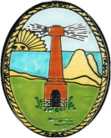 Escudo del partido de Necochea